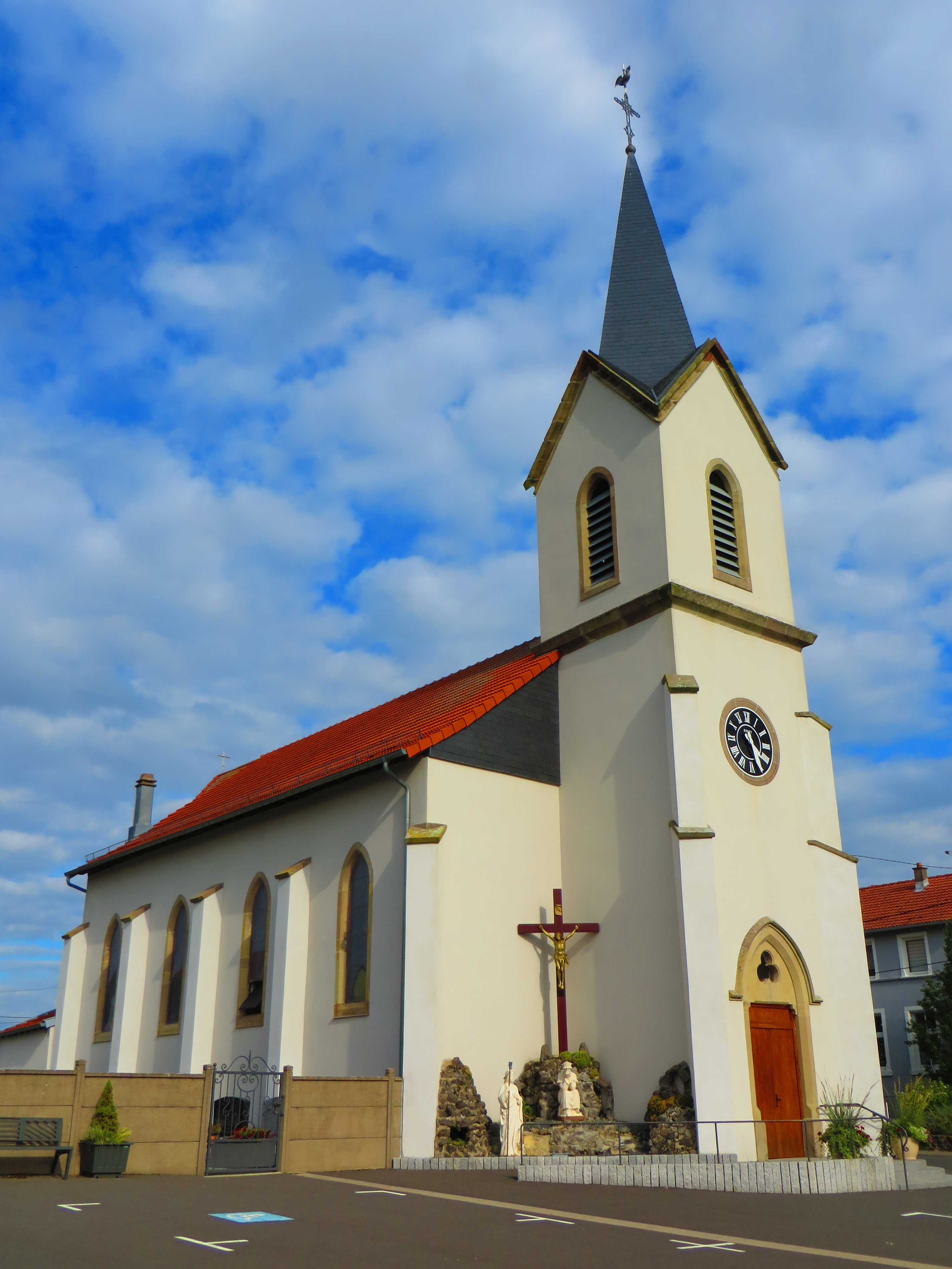 Hazembourg l'église Saint-Étienne